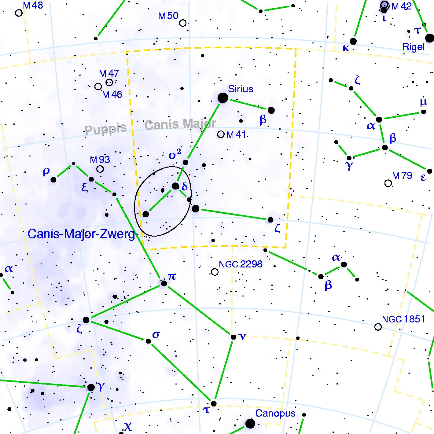 Karte der Canis-Major-Zwerggalaxie